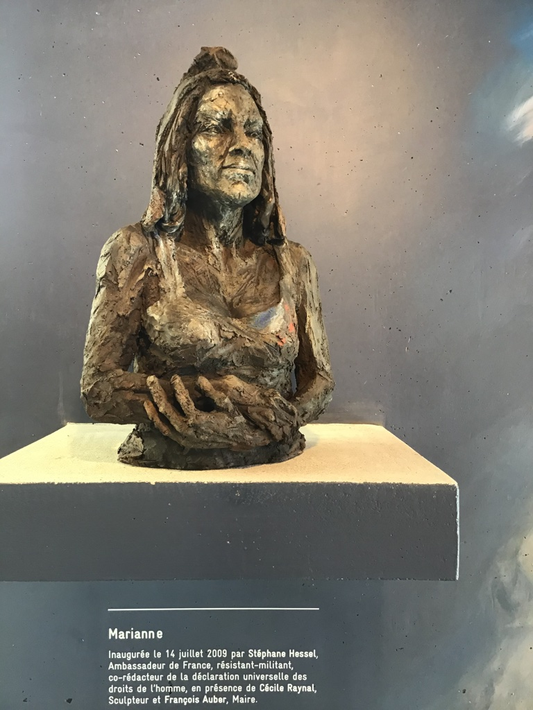 Marianne - 2009/2018 hauteur 75 cm collection publique, propriété de la Ville de Saint Jouin de Bruneval (76 - France)